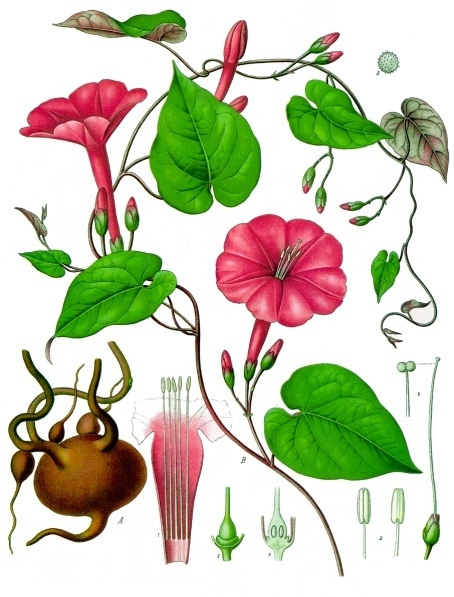 Jalape. A Wurzelknolle natürl. Grösse; B blühendes Stengelstück, desgl.; 1 Blüthenkrone im Längsschnitt, desgl.; 2 Staubgefässe, vergrössert; 3 Pollen, desgl.; 4 Kelch mit Griffel und Narbe, desgl.; 5 Fruchtknoten mit Scheibe desgl.; 6 derselbe in Längsschnitt, desgl.